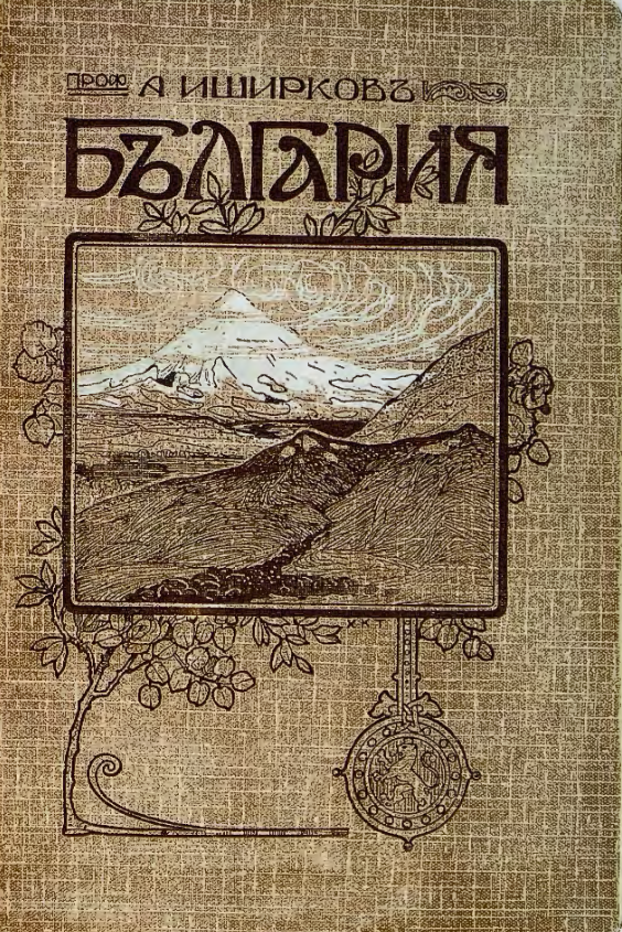 Факсимиле на корицата на „България. Географски бележки“ от проф. Анастас Иширков. Издадена в София през 1910 г.